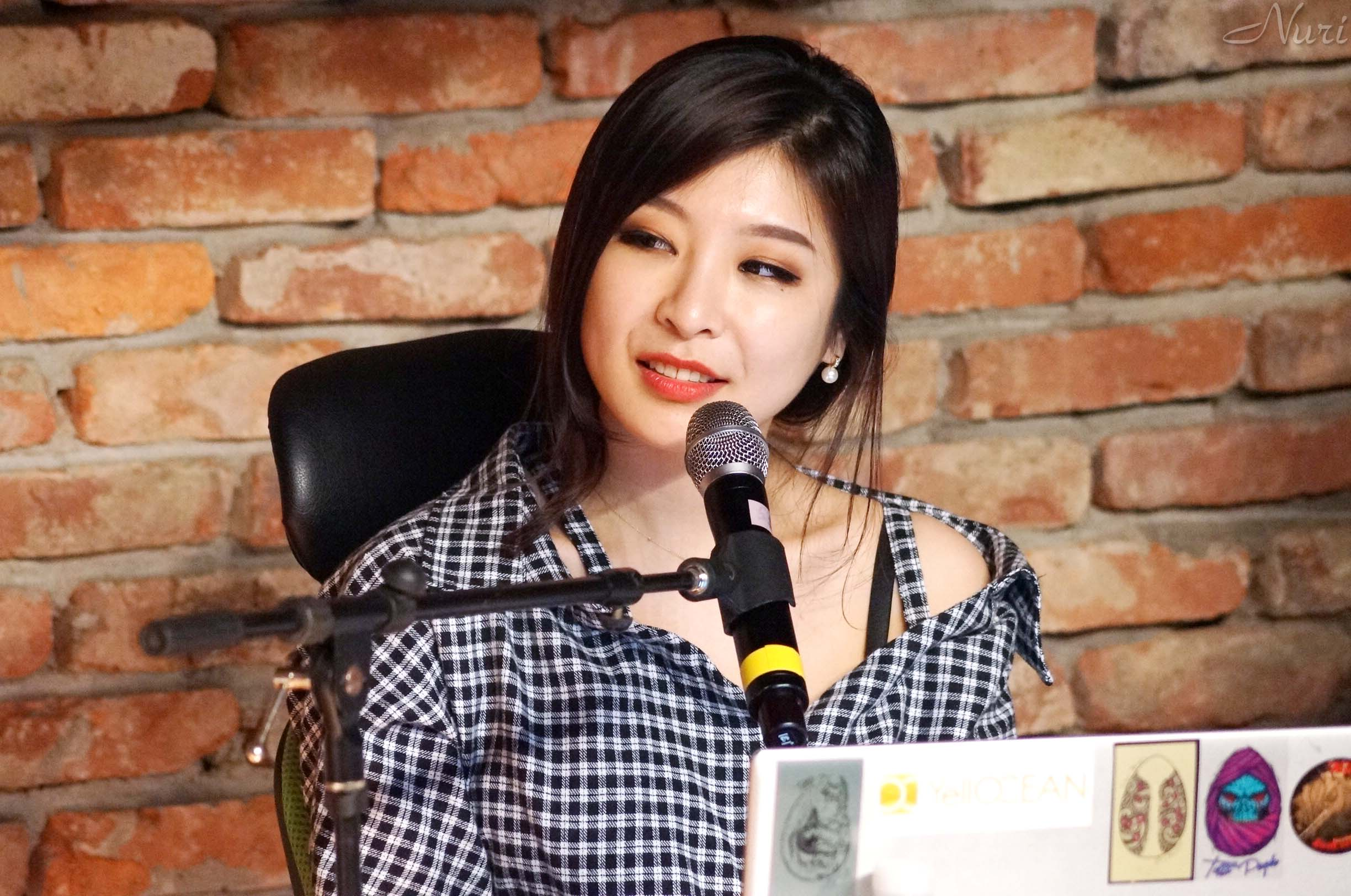 2015년 4월 11일 클럽 레블(CLUB REVEL)에서 열린 옐로 오션 쇼 (Yello Ocean Show vol 2)에 있는 박현서